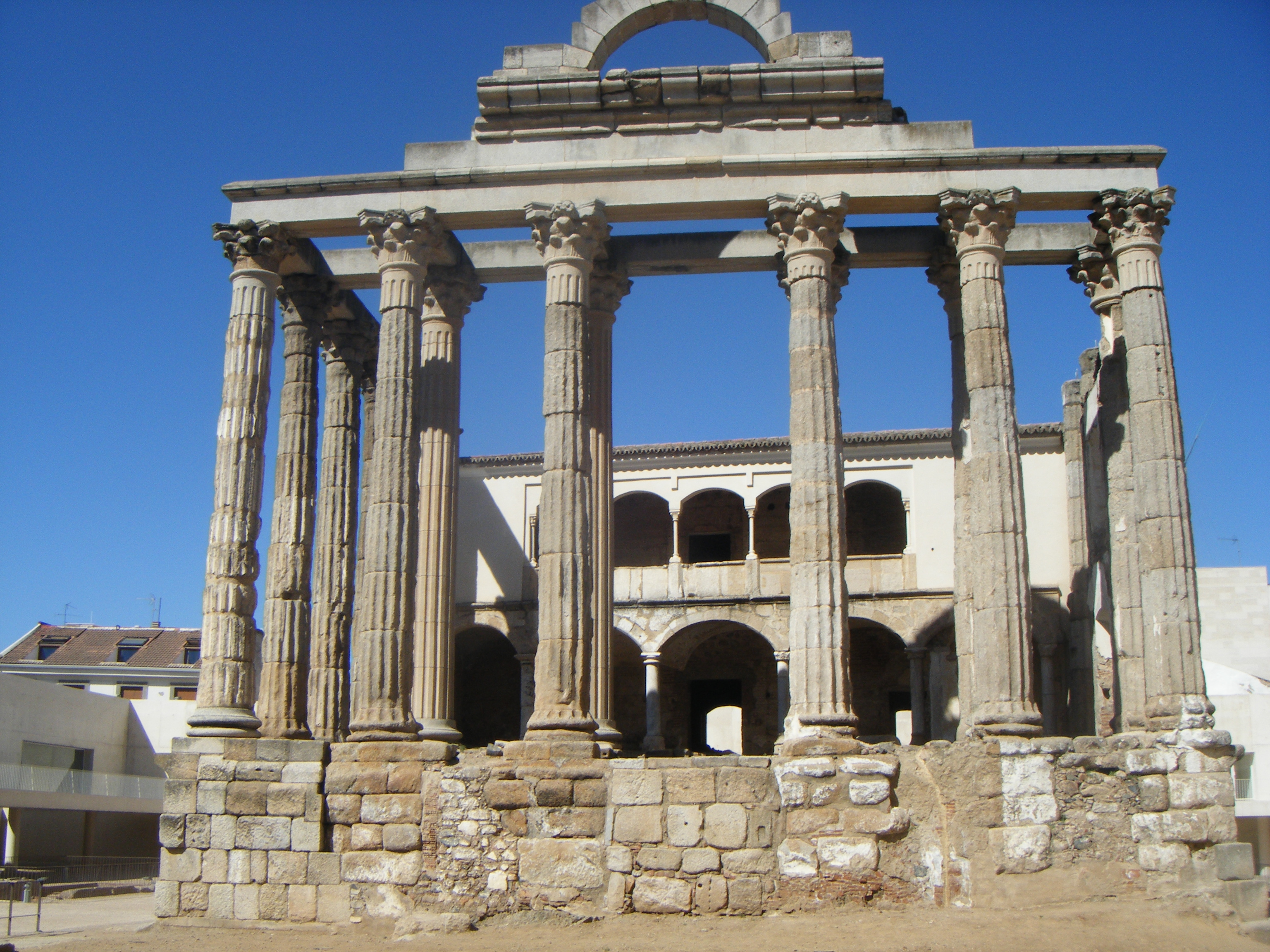 Templo dedicado a la diosa Diana, sito en Mérida